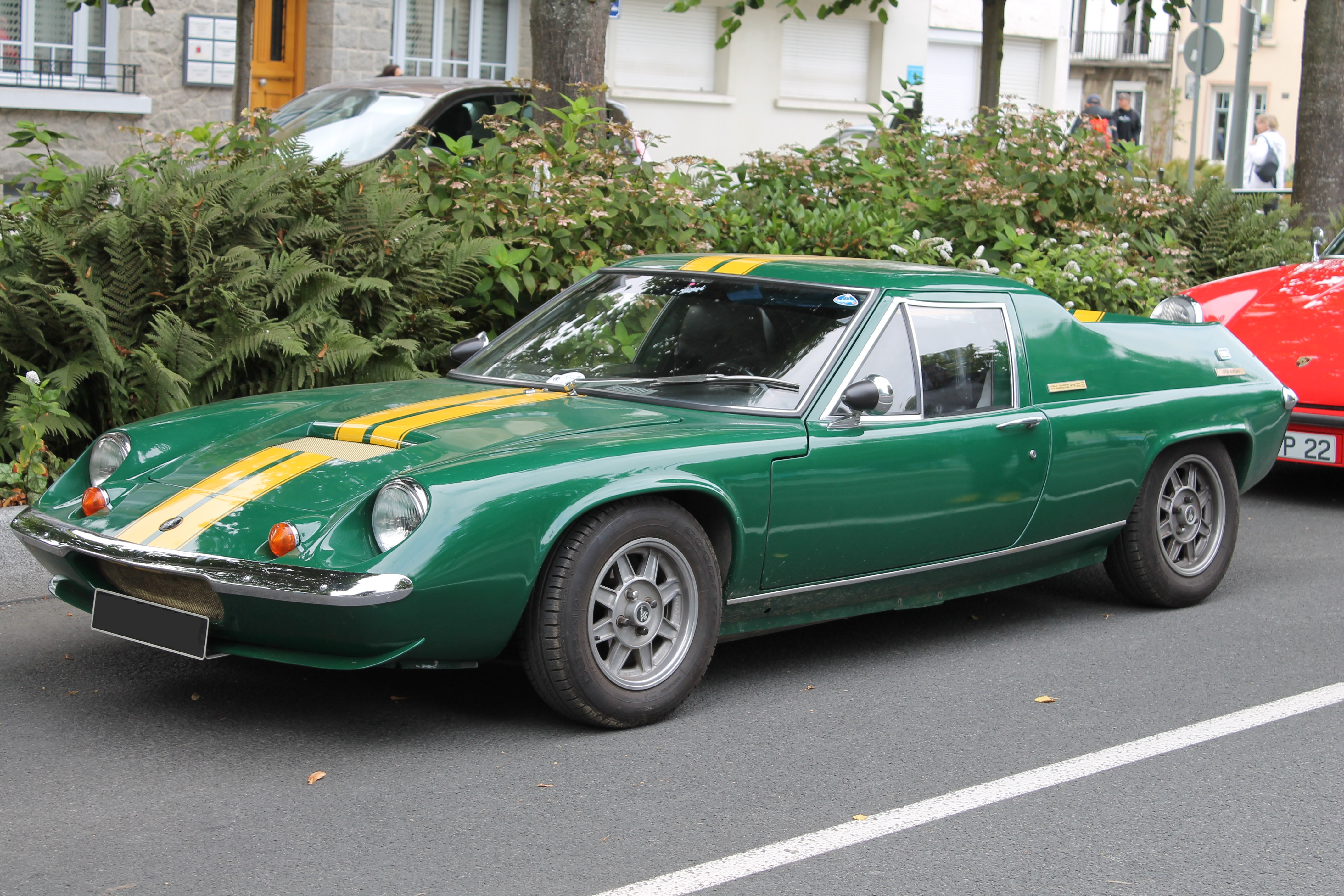 Lotus Europa - Coupe Florio 2013 (avant)